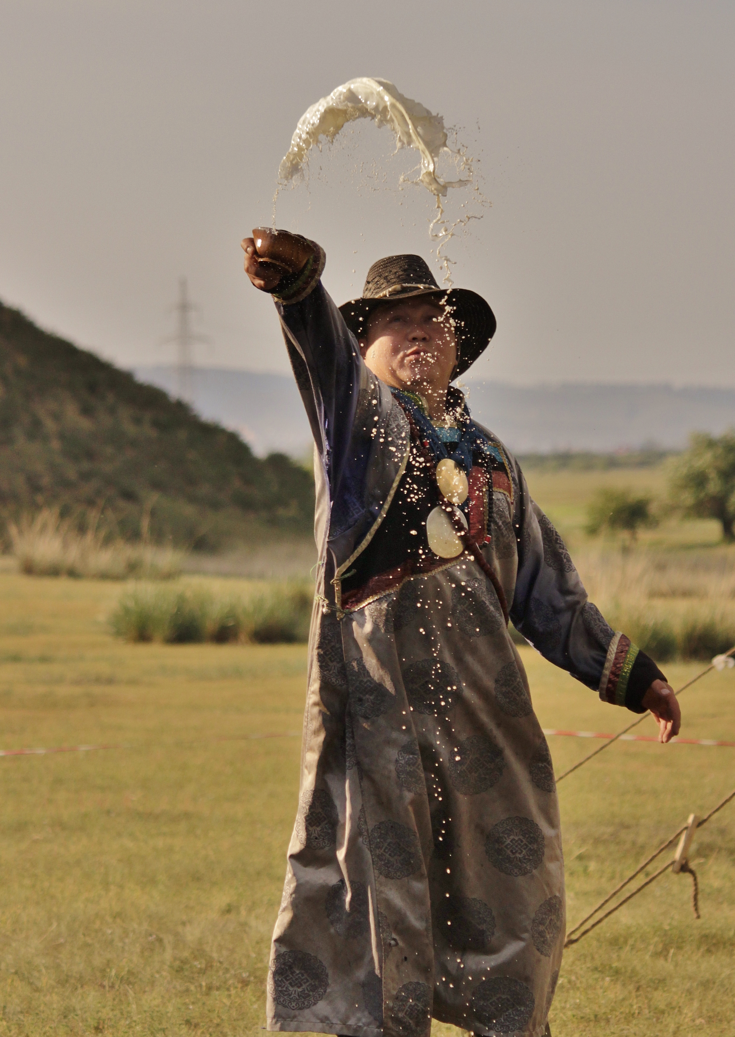 Шаман Бэликто делает подношение молоком духам местности